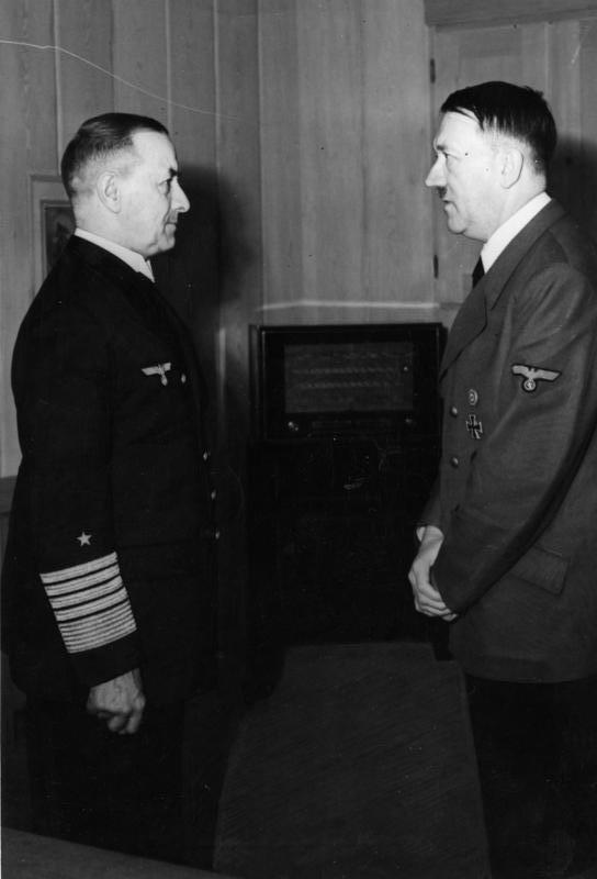 Erich Raeder, Adolf Hitler Zentralbild In seinem Hauptquartier empfing Hitler Großadmiral Raeder, aus Anlaß seiner Ernennung zum Admiralinspekteur der Kriegsmarine des faschistischen Deutschland. Aufn. 1943 [Entlassung von Erich Raeder (links) als Oberbefehlshaber der Kriegsmarine und Ernennung durch Adolf Hitler zum "Admiralinspekteur"; Ende Januar / Anfang Februar 1943] Abgebildete Personen: Hitler, Adolf: Reichskanzler, Deutschland Raeder, Erich: Großadmiral, Oberbefehlshaber der Kriegsmarine, Deutschland (PND 118743511)